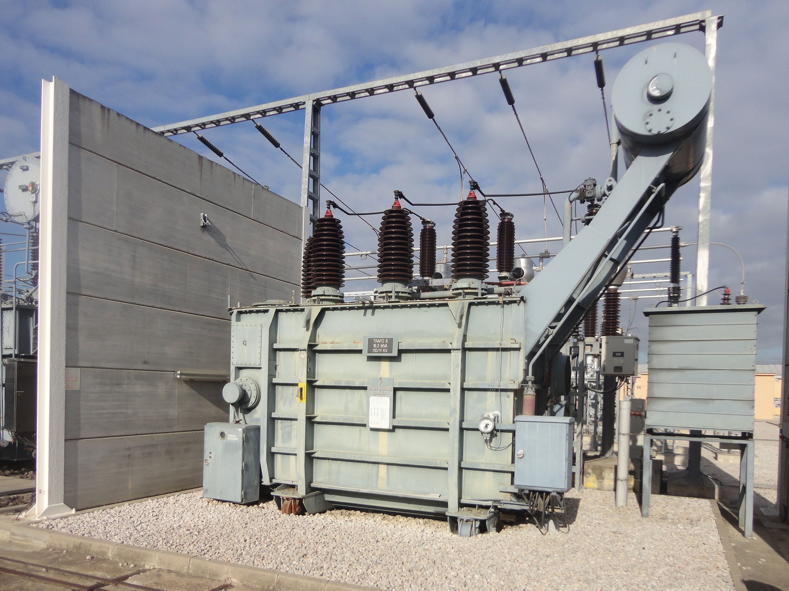 Subestació de Mas Xirgu de Girona.